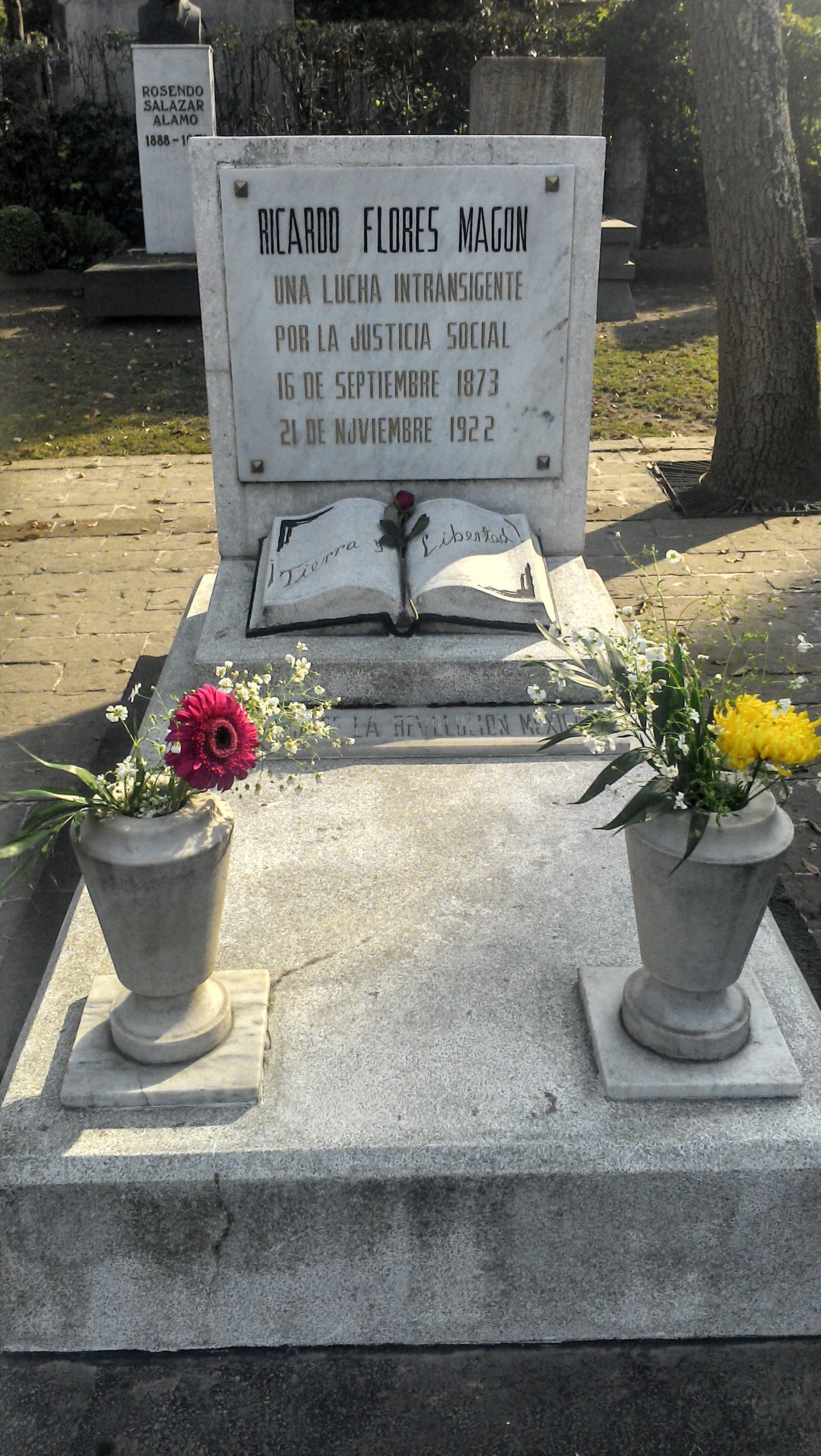 Rotonda de las Personas Ilustres, Panteón Civil de Dolores, Ciudad de México, México.